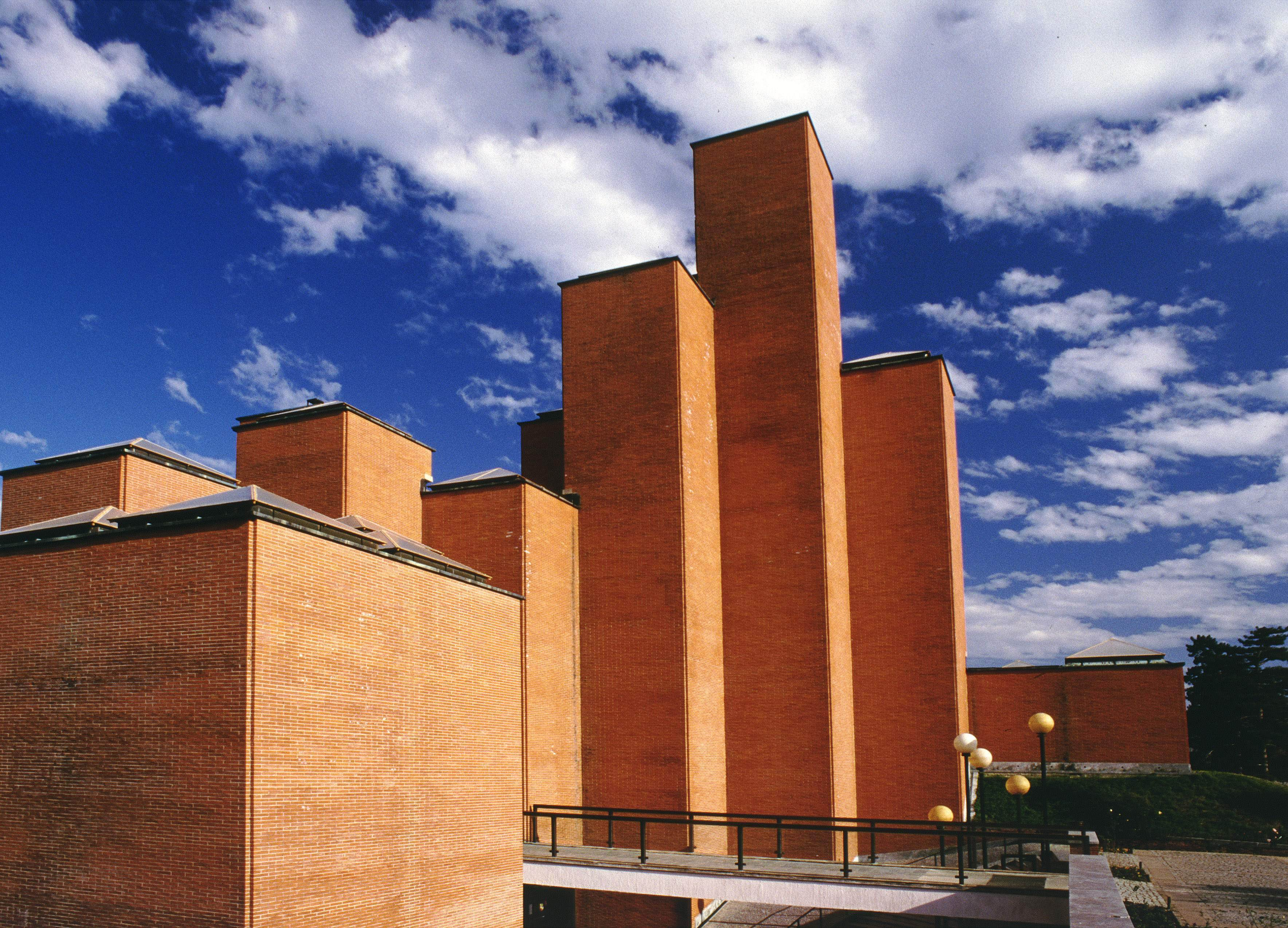 Museum of the genocide in Kragujevac, Serbia/Le musée du génocide, Serbie